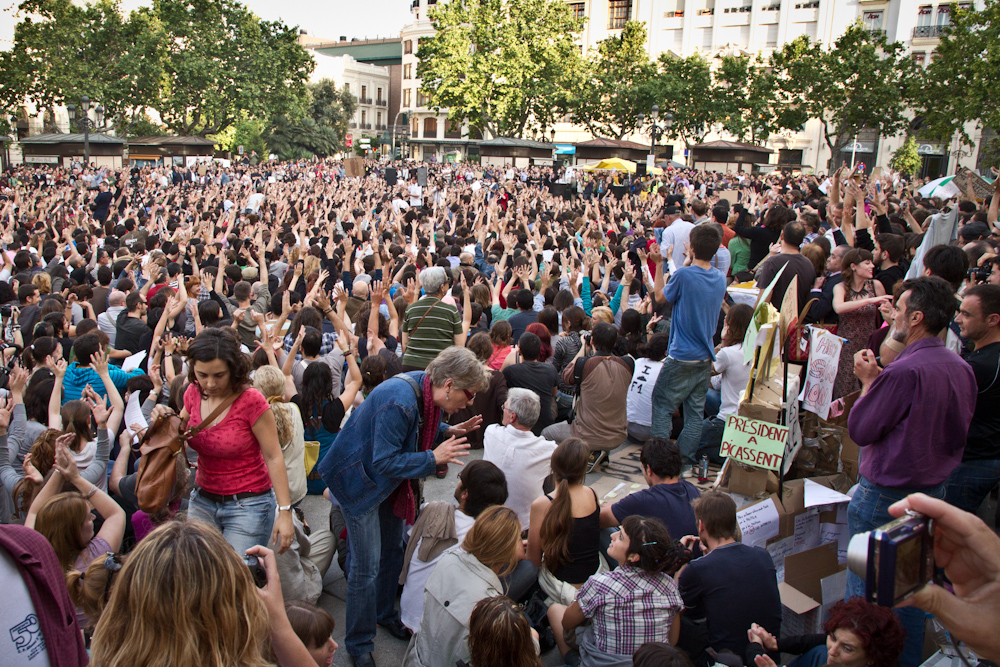 SPANISHREVOLUTION Fotografías del Movimiento 15M en Valencia, Asamblea popular del día 19 de mayo de 2011. Puedes utilizar, compartir, descargar y difundir esta fotografía como desees. Si necesitas una copia de mayor calidad no dudes en solicitarla. "SPANISH REVOLUTION" & "15 Movement" photography in the city of Valencia, popular Assembly on 19 May 2011. You can use, share, download and spread this picture as you want. If you need a higher quality copy do not hesitate to apply. Street photography only for cultural purposes. If you want more information about this image and their rights, please email me. Check out "Creative Commons" license for details. Any use of this photograph should include in a readable way, the following information about the author: ©Adolfo Senabre - .es Fotografía social y urbana tomada únicamente con fines culturales. Si quieres más información acerca de esta imagen y los derechos de la misma, por favor, contacta conmigo. Consulta las licencias "Creative Commons" para saber más. Cualquier uso de esta fotografía debe incluir de forma legible los siguientes datos del autor: ©Adolfo Senabre - .es